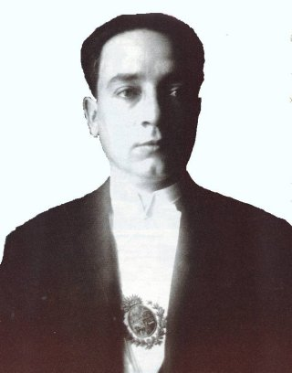 Retrato de Baltasar Brum (1883 - 1933), presidente del Uruguay.